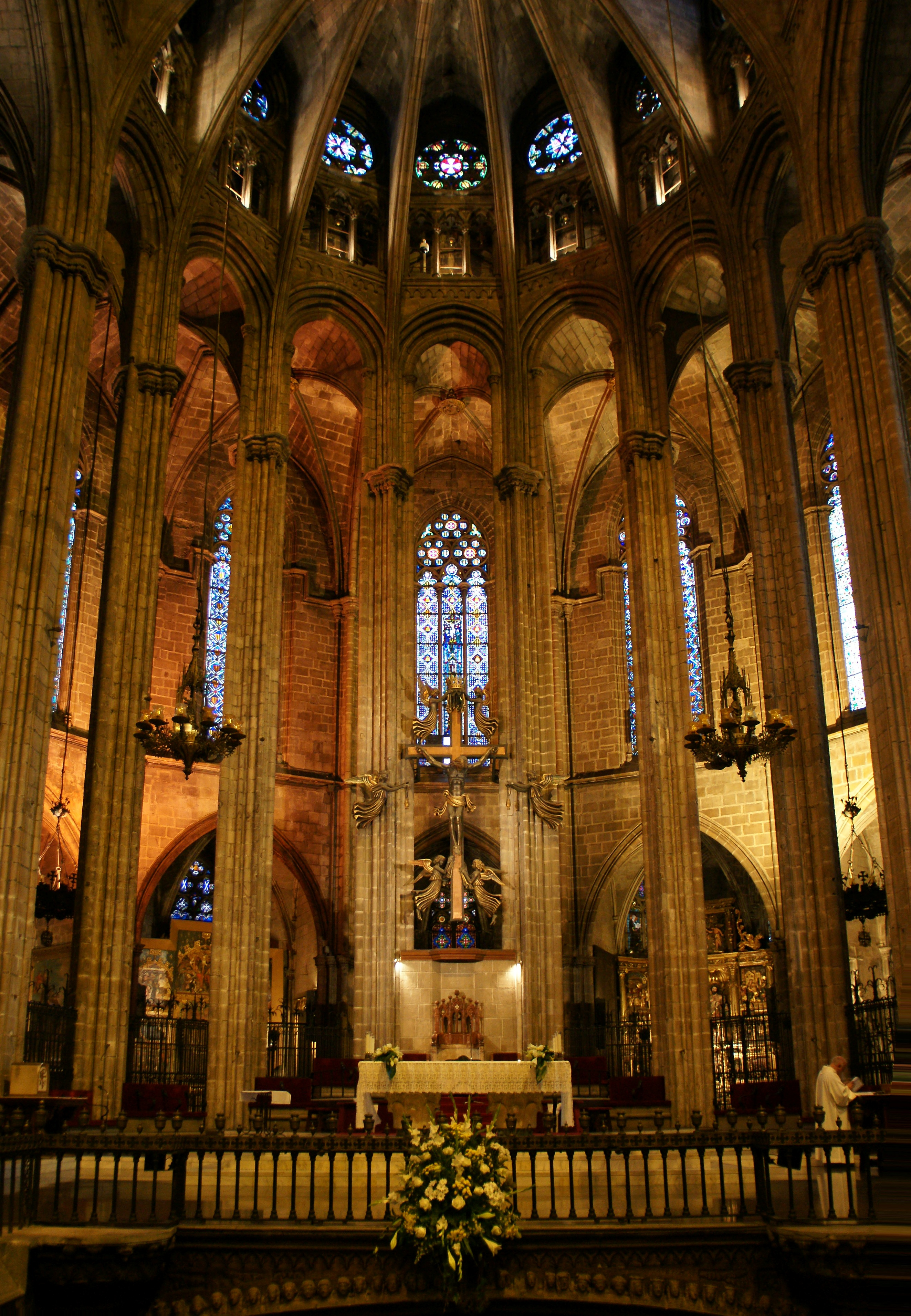 La Catedral ist eine gotische Kathedrale in Barcelona und Metropolitankirche des Erzbistums Barcelona. Sie befindet sich am Platz Pla de la Seu im Stadtviertel Barri Gòtic und ist der Heiligen Eulalia geweiht.